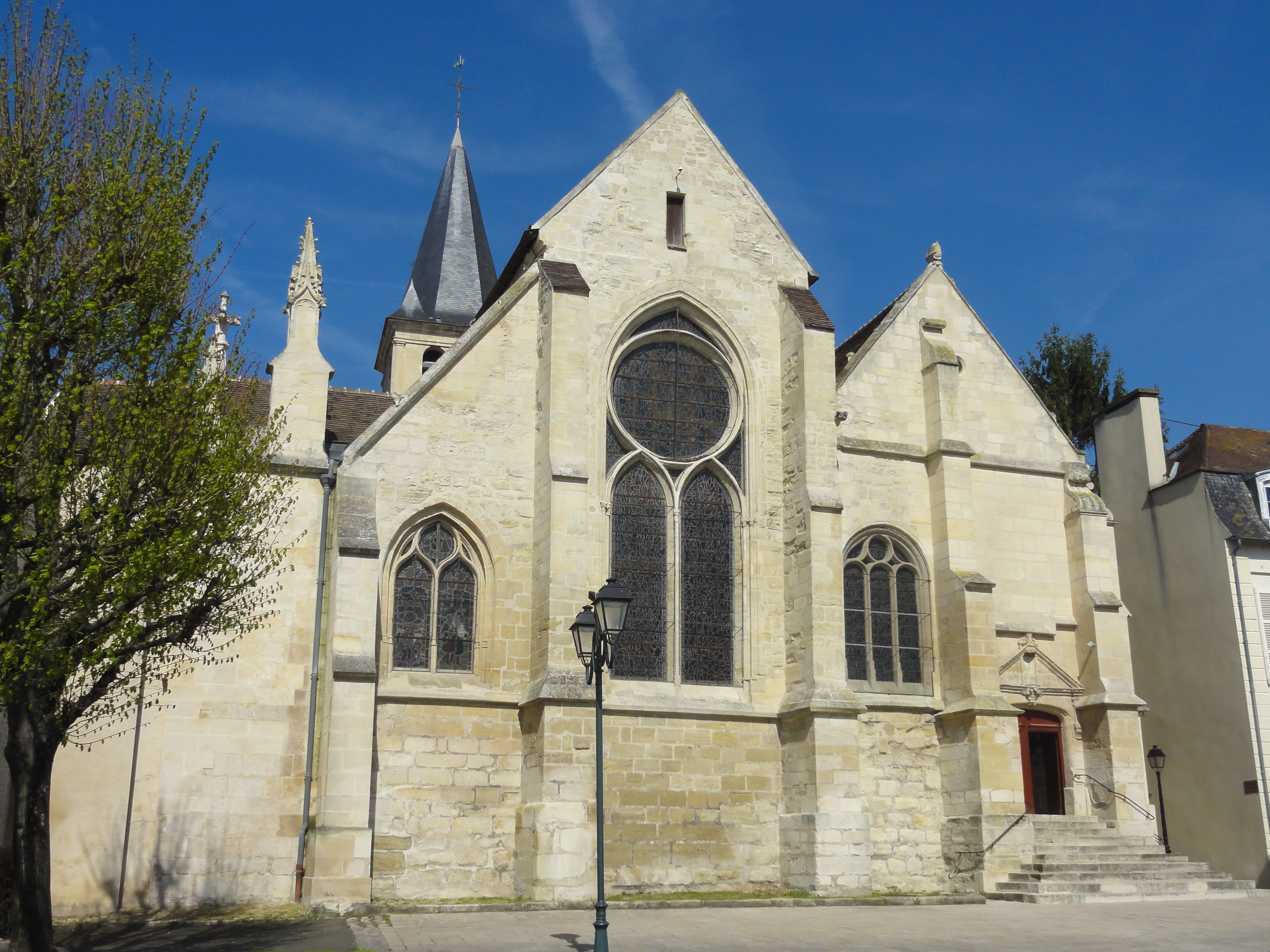 Église Saint-Germain d'Andrésy - voir titre.